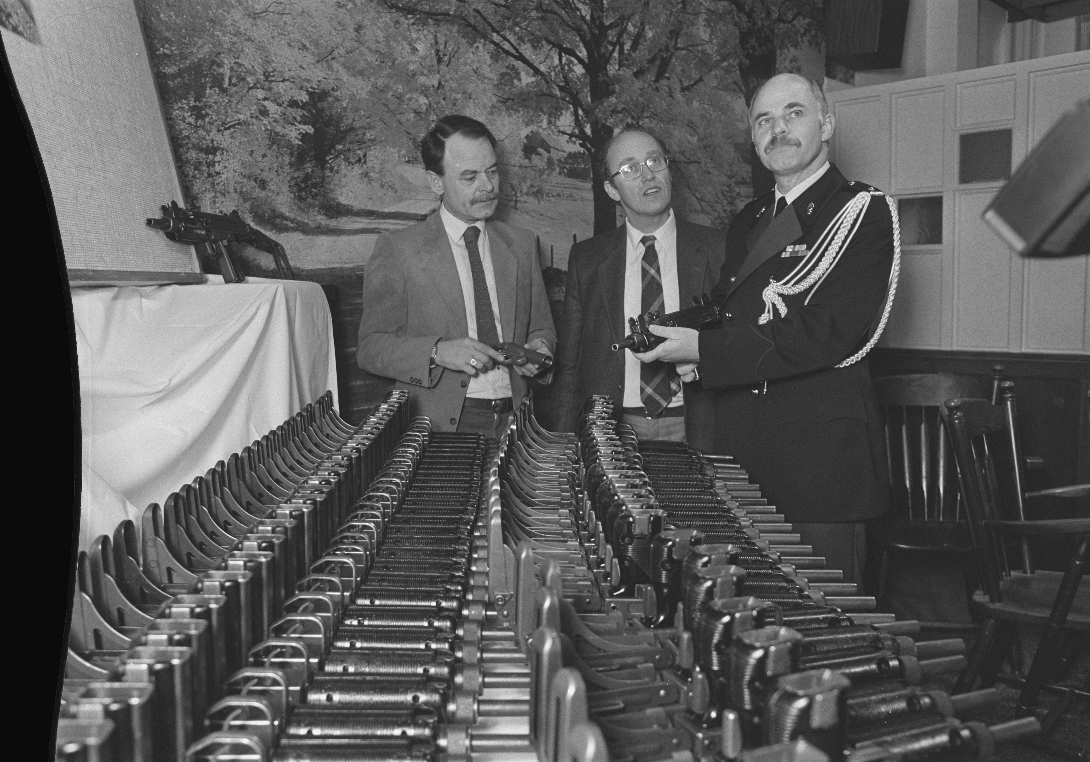 Collectie / Archief : Fotocollectie Anefo Reportage / Serie : [ onbekend ] Beschrijving : Persconferentie Marechaussee in Ede i.v.m. oplossing wapendiefstal; Martens, Beziers en onderzoeksleider majoor Beelen Datum : 10 februari 1987 Locatie : Ede Trefwoorden : diefstallen, misdaad, persconferenties, politie, wapens Persoonsnaam : Beelen, Beziers Instellingsnaam : Koninklijke Marechaussee Fotograaf : Croes, Rob C. / Anefo Auteursrechthebbende : Nationaal Archief Materiaalsoort : Negatief (zwart/wit) Nummer archiefinventaris : bekijk toegang 2.24.01.05 Bestanddeelnummer : 933-8865